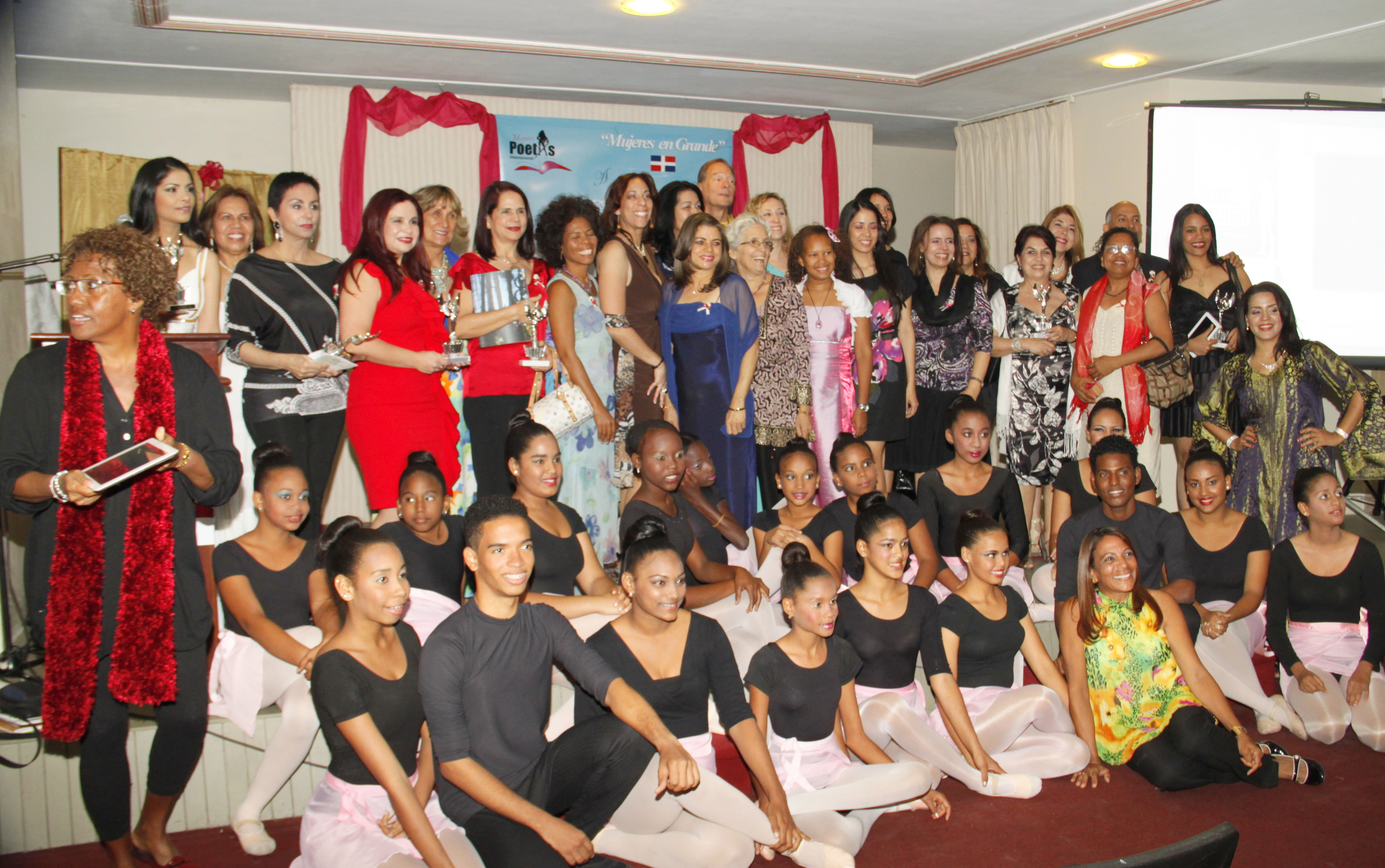 Poetas y artistas participantes en Grito de Mujer 2013